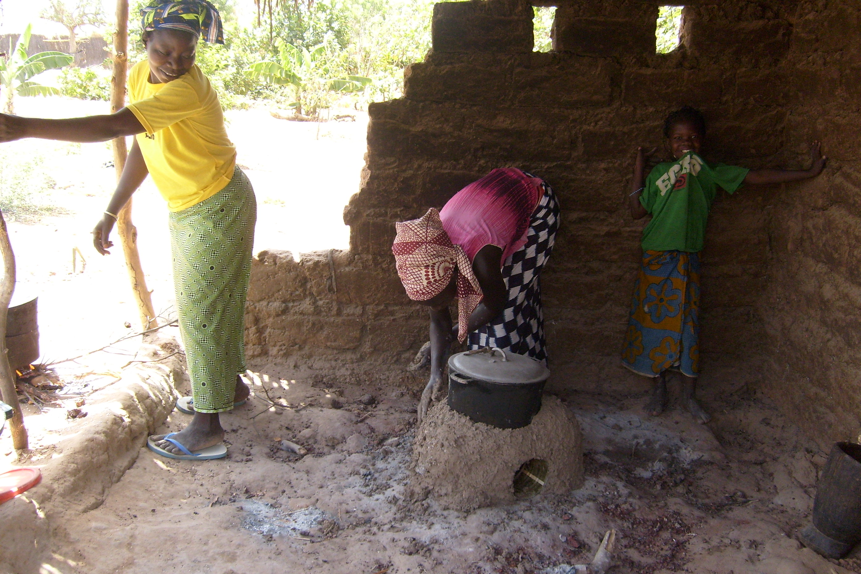 Mode de cuisson à Kaffrine (Sénégal)